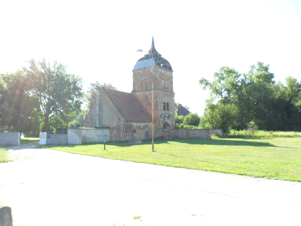 Wjazd do zamku w Bieczu